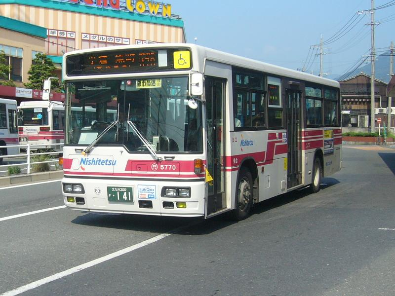 登録番号 北九州200か141 西鉄バス北九州門司自動車営業所所属 車番5770 2007年7月26日 砂津バス停にて撮影